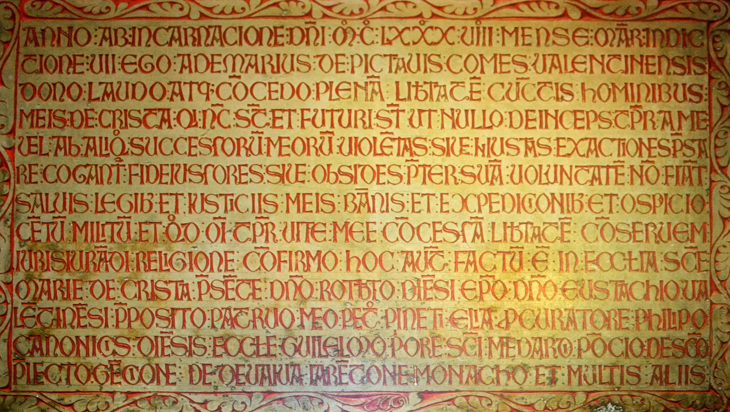 Charte attribuée aux habitants de Crest (Drôme) par Adhémar de Poitiers, comte de Valentinois, en 1188.